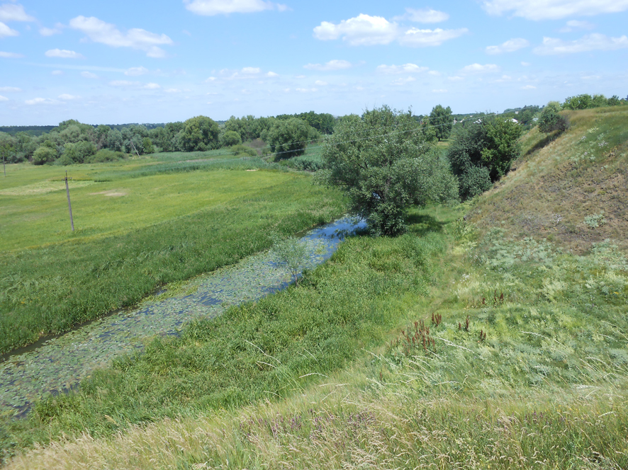 Річка Соб у селі Кисляк